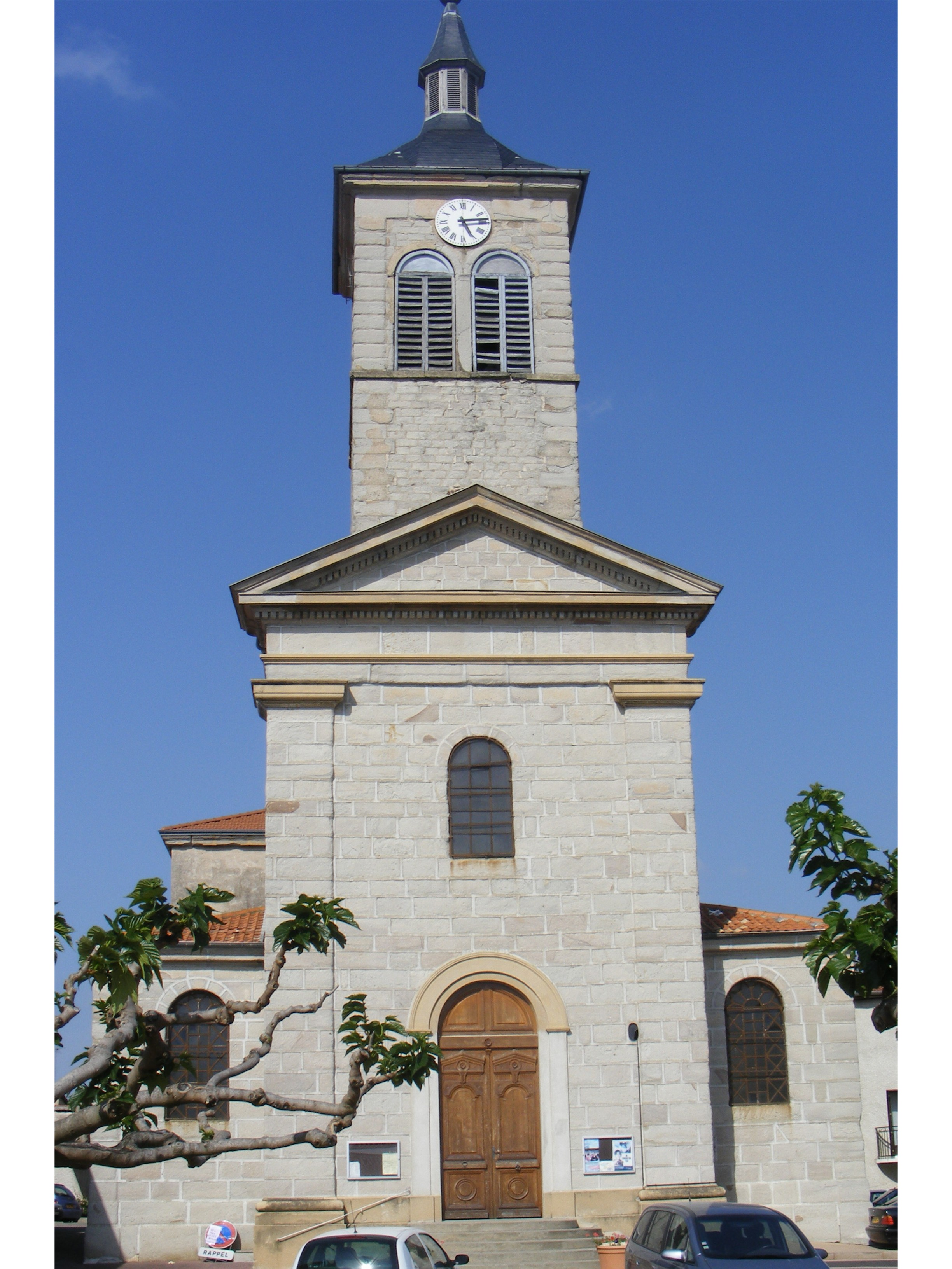 église de Génilac